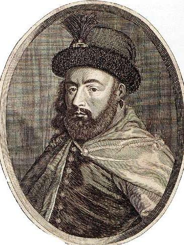 Gergoge Rákóczi II Transilvanian Prince